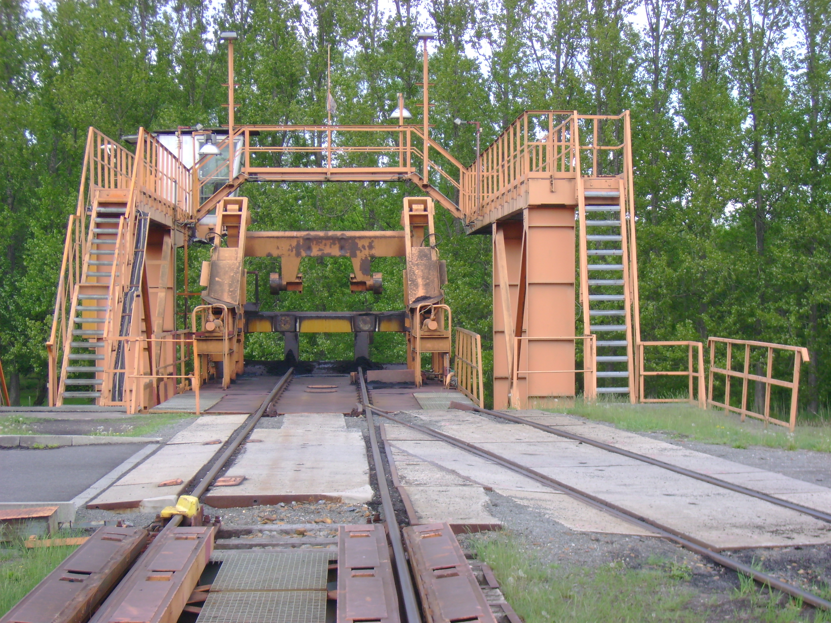 Ein- und ausfahrt einer Waggonstirnwandkippanlage zum schnellen Umschlagen von Schüttgütern